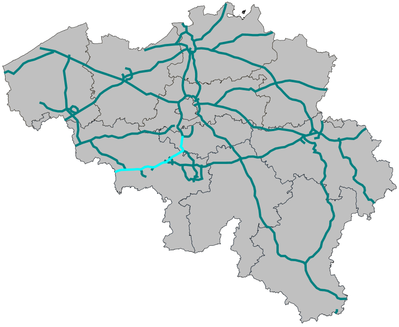 Traject A7 (België)